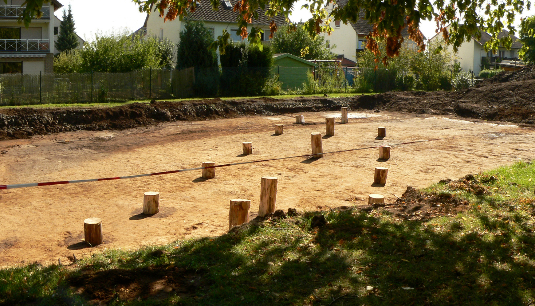 Grabungsfläche 2016 der Siedlung Rosdorf Mühlengrund mit rekonstruiertem Hausgrundriss anhand von Pfostenlöchern, zur Kenntlichkeit mit Baumstämmen markiert